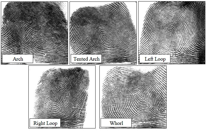 Классы отпечатков